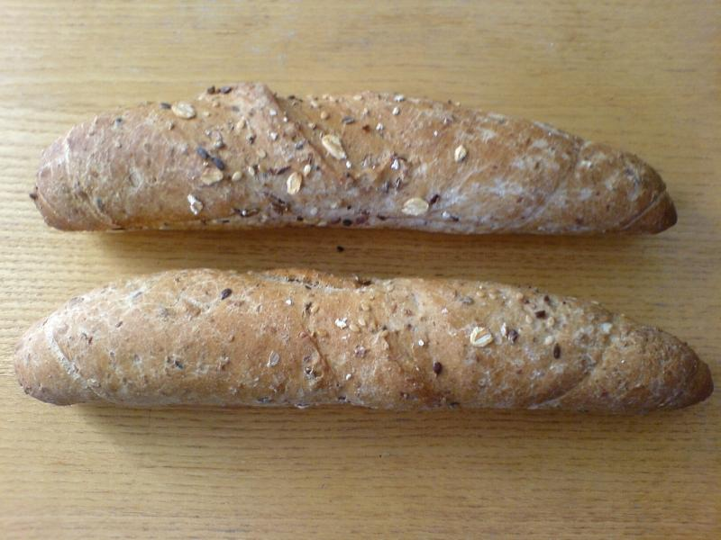 rohlik celozrny - pecivo (pastery)